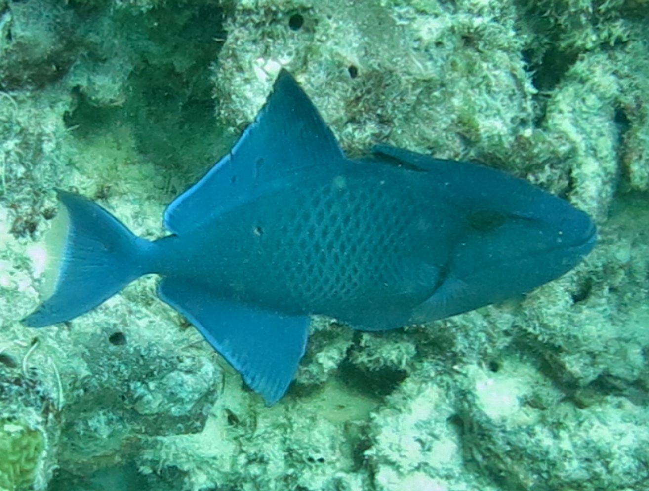 Un baliste bleu (Odonus niger), aux Maldives (Landaagiraavaru, atoll de Baa).